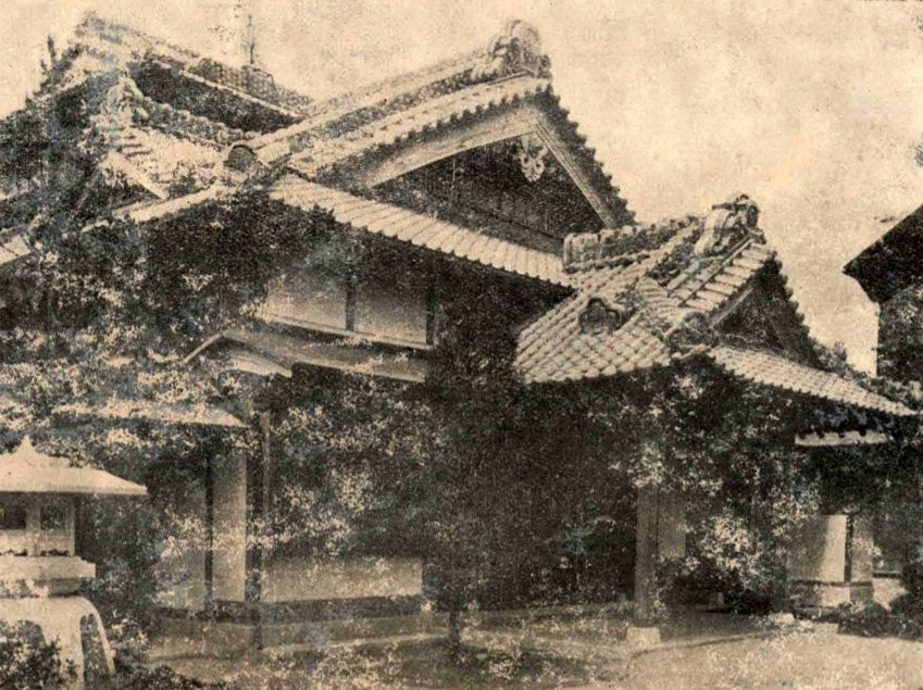 中文（台灣）: 基隆木村久太郎宅邸，後由顏國年於1918年購入，成為顏家陋園